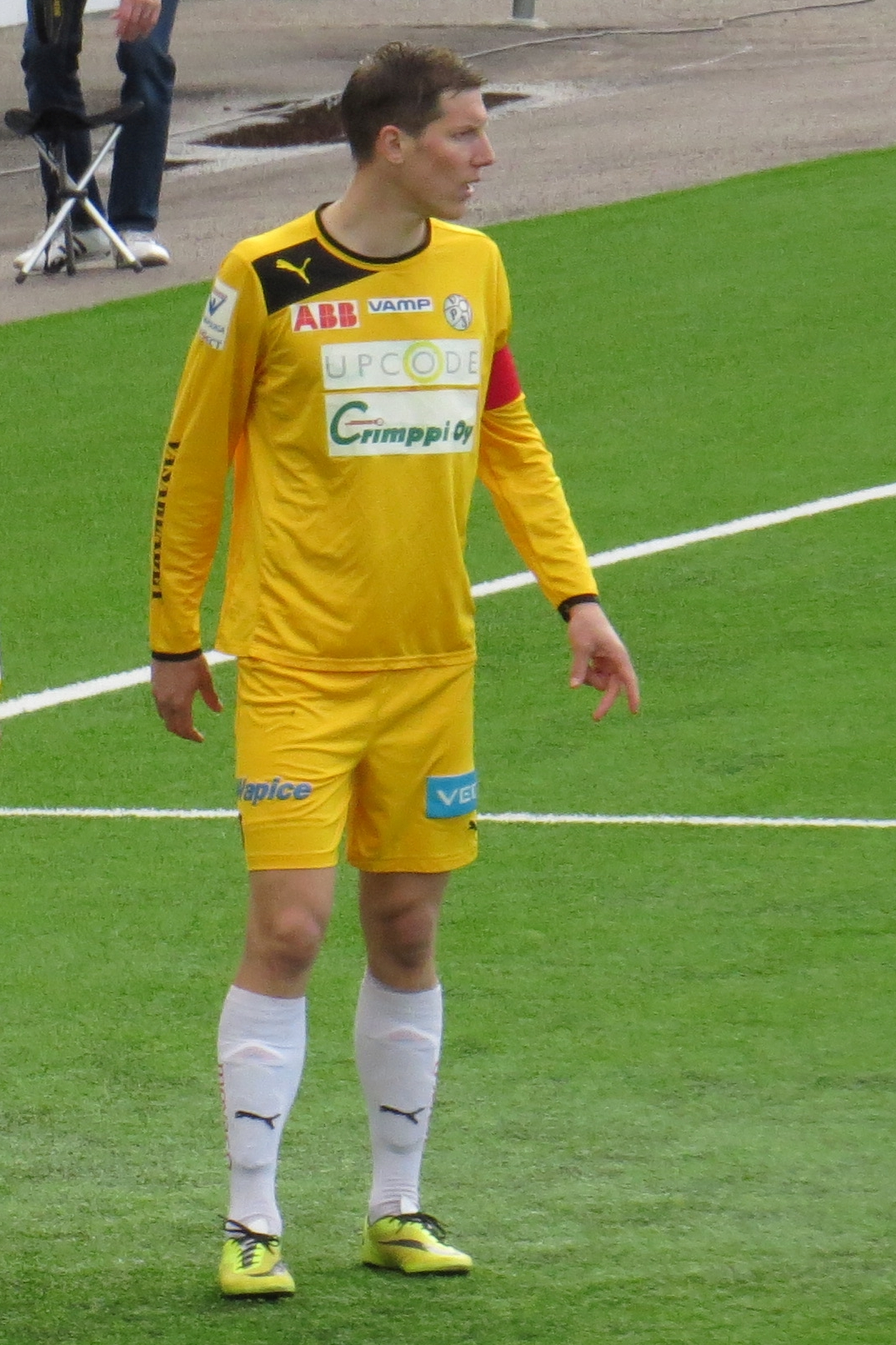 Ville Koskimaa, suomalainen jalkapalloilija Vaasan Palloseuran joukkueessa kaudella 2015.